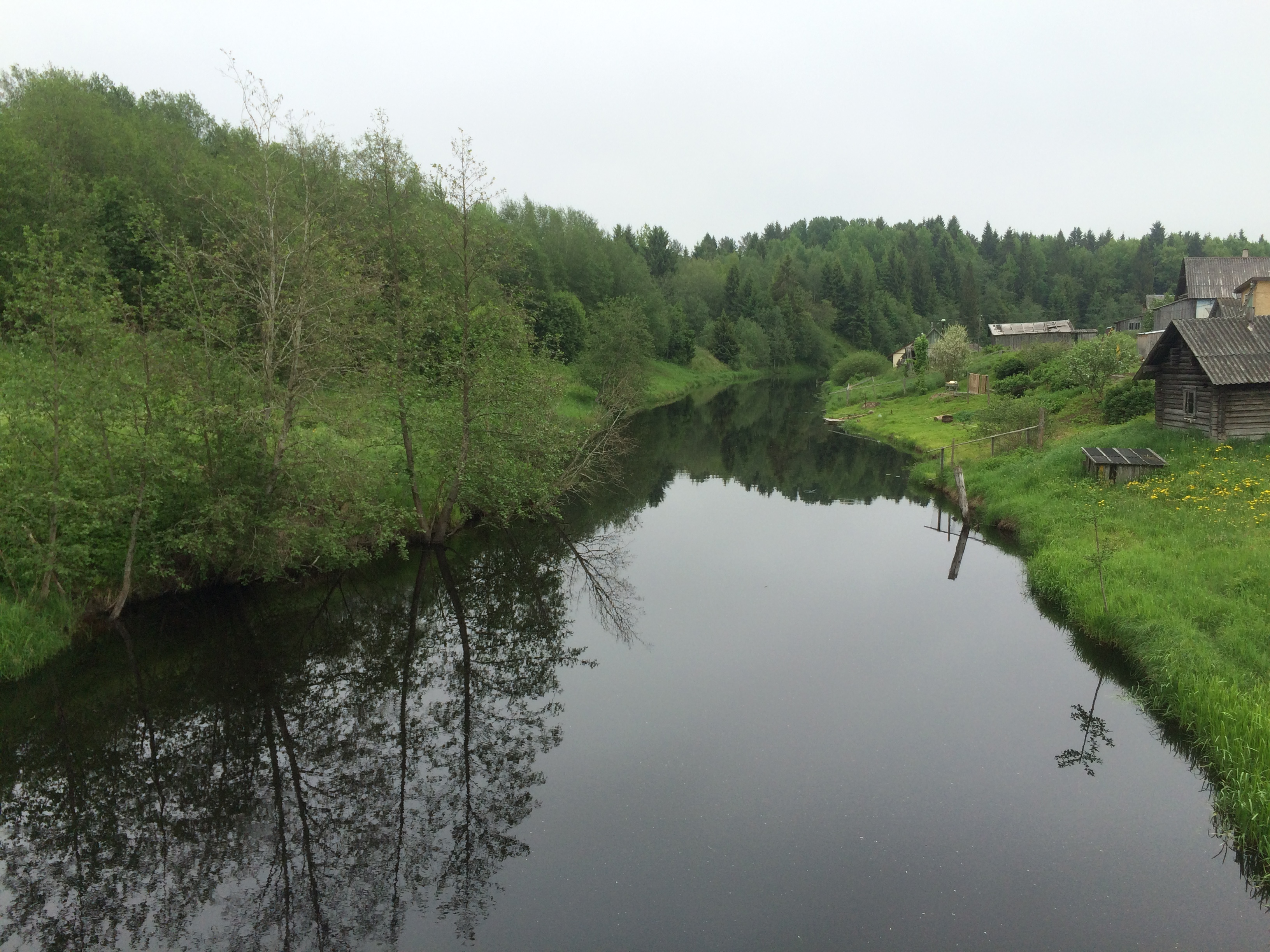 Новзема